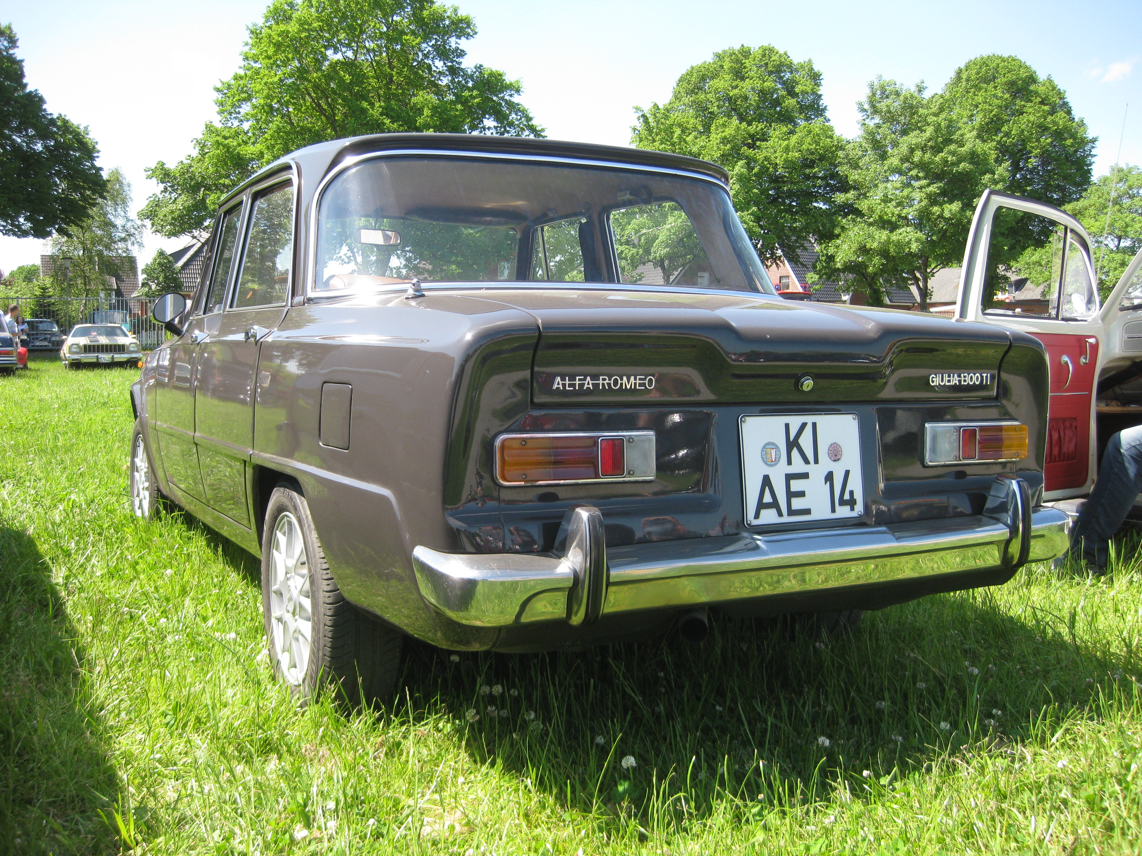 Alfa Romeo Giulia 1300ti Heckansicht